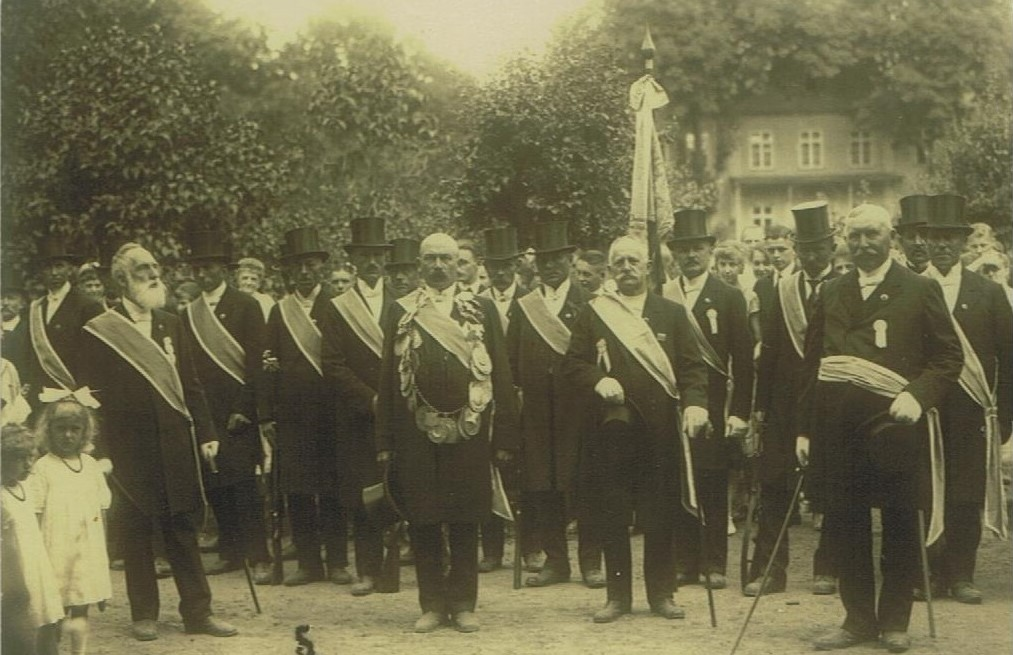 Dobbertiner Schützengilde im Kloster Dobbertin, Aufstellung vor dem Dominahaus zur Ansprache der Frau Domina Auguste Caroline von Pressentin von ihrem Balkon, im Hintergrund das Klosterhauptmannshaus.